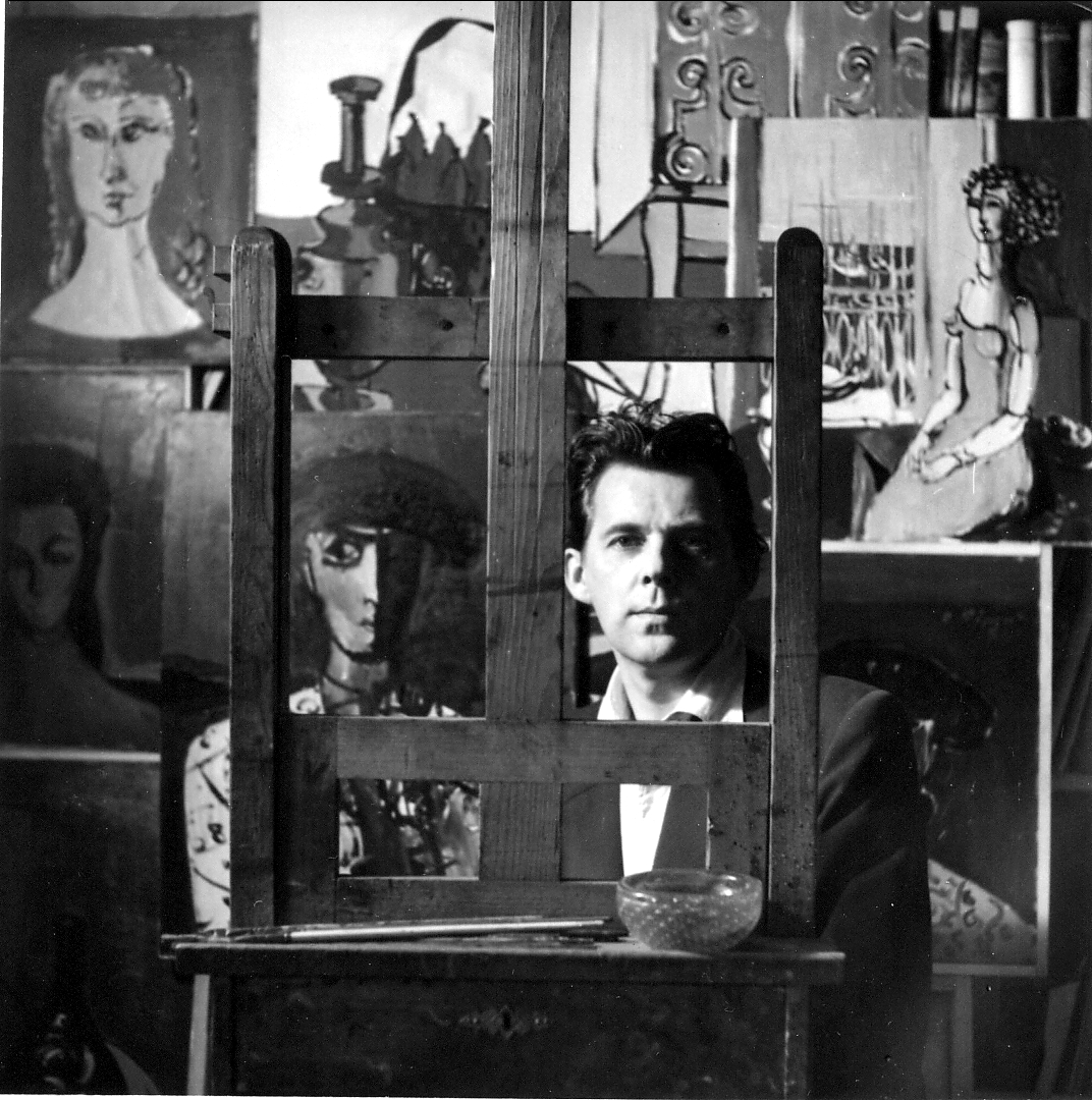 Hans Robert Pippal (1915-1998), österrechsischer Maler und Gestalter, mit Staffelei in seinem Atelier, 1954.